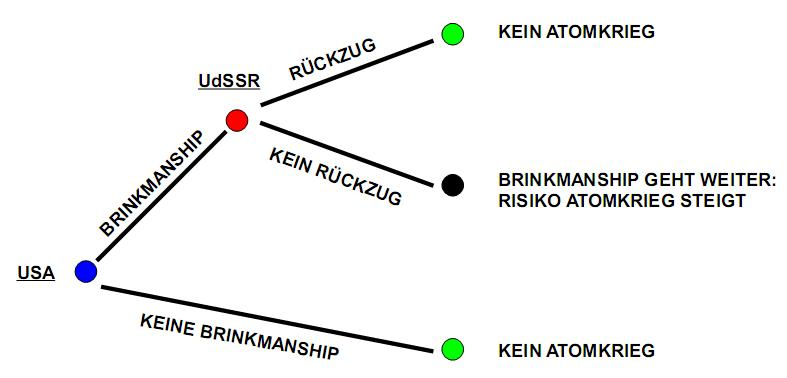 Brinkmanship am Beispiel der Kuba-Krise